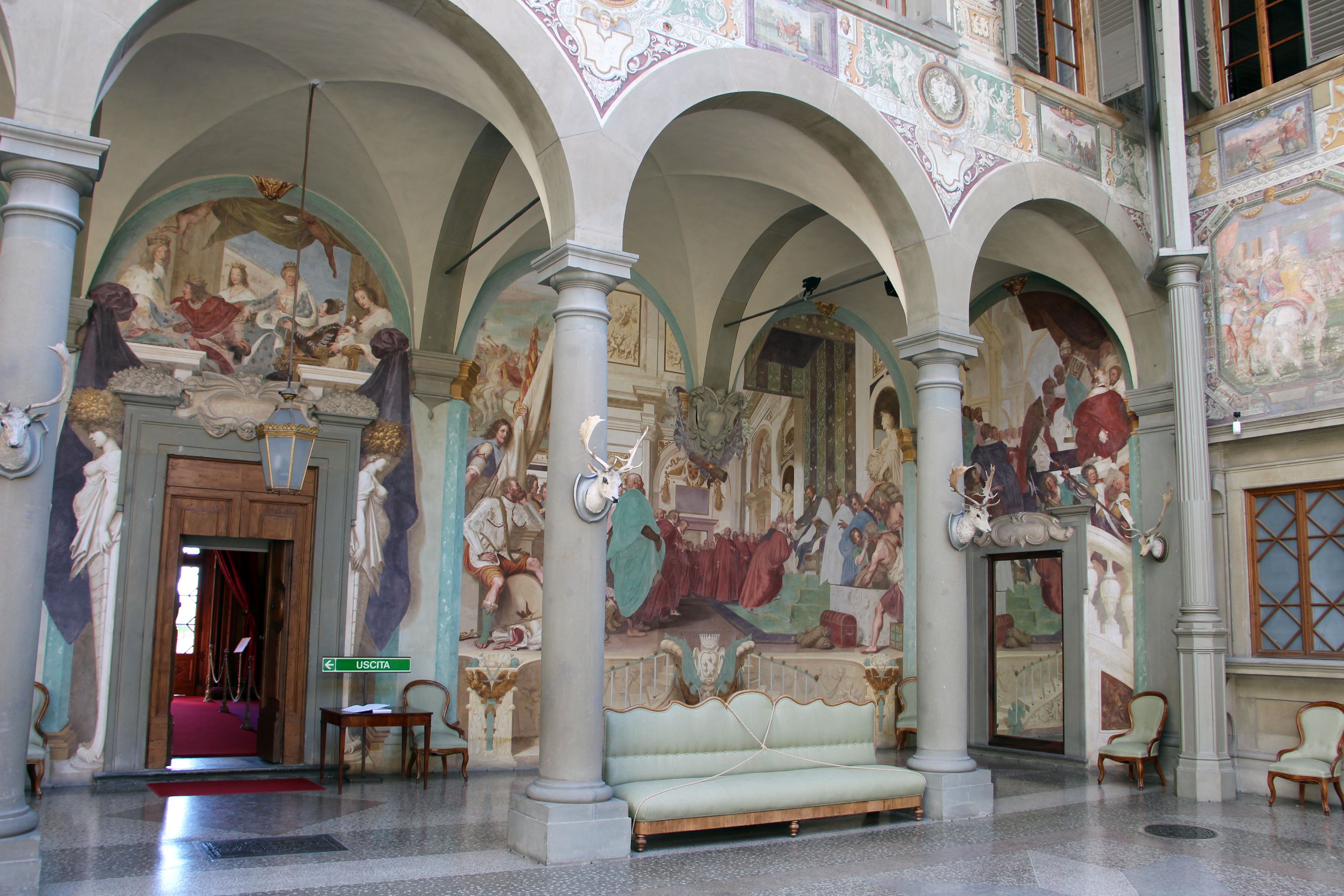 Villa medicea della Petraia - MIBAC This is a photo of a monument which is part of cultural heritage of Italy.